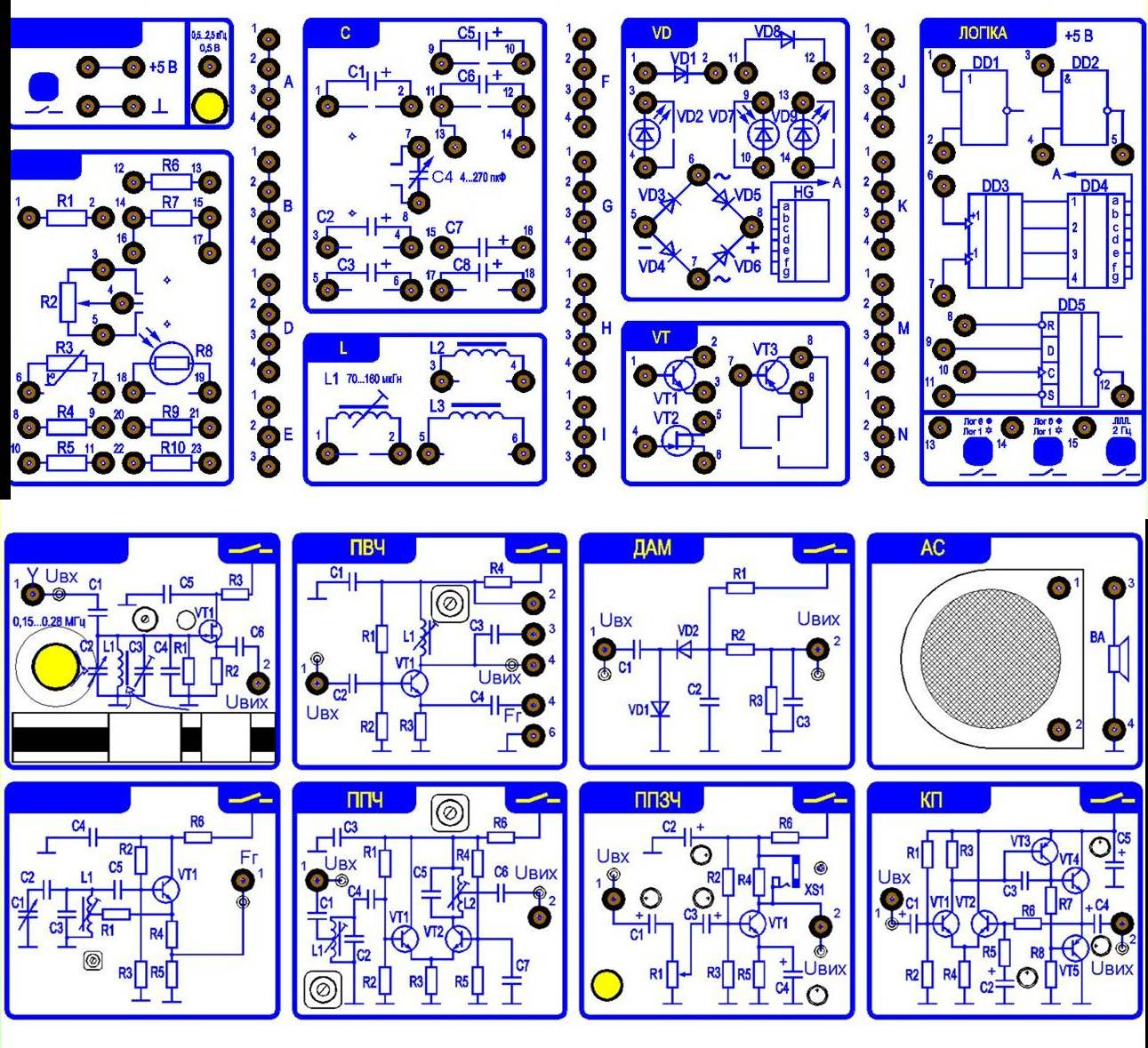 Дослідне поле навчального приладу «Елементи та системи фізичного експерименту ЕСФЕ-2 «Електрорадіотехніка»